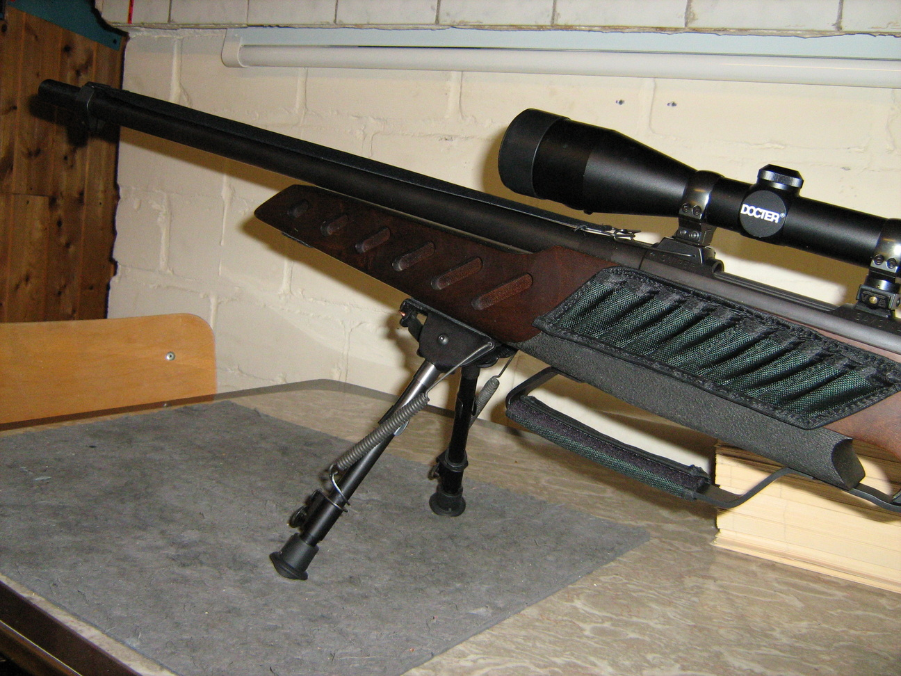 Gewehr mit Zielfernrohr und Zweibein